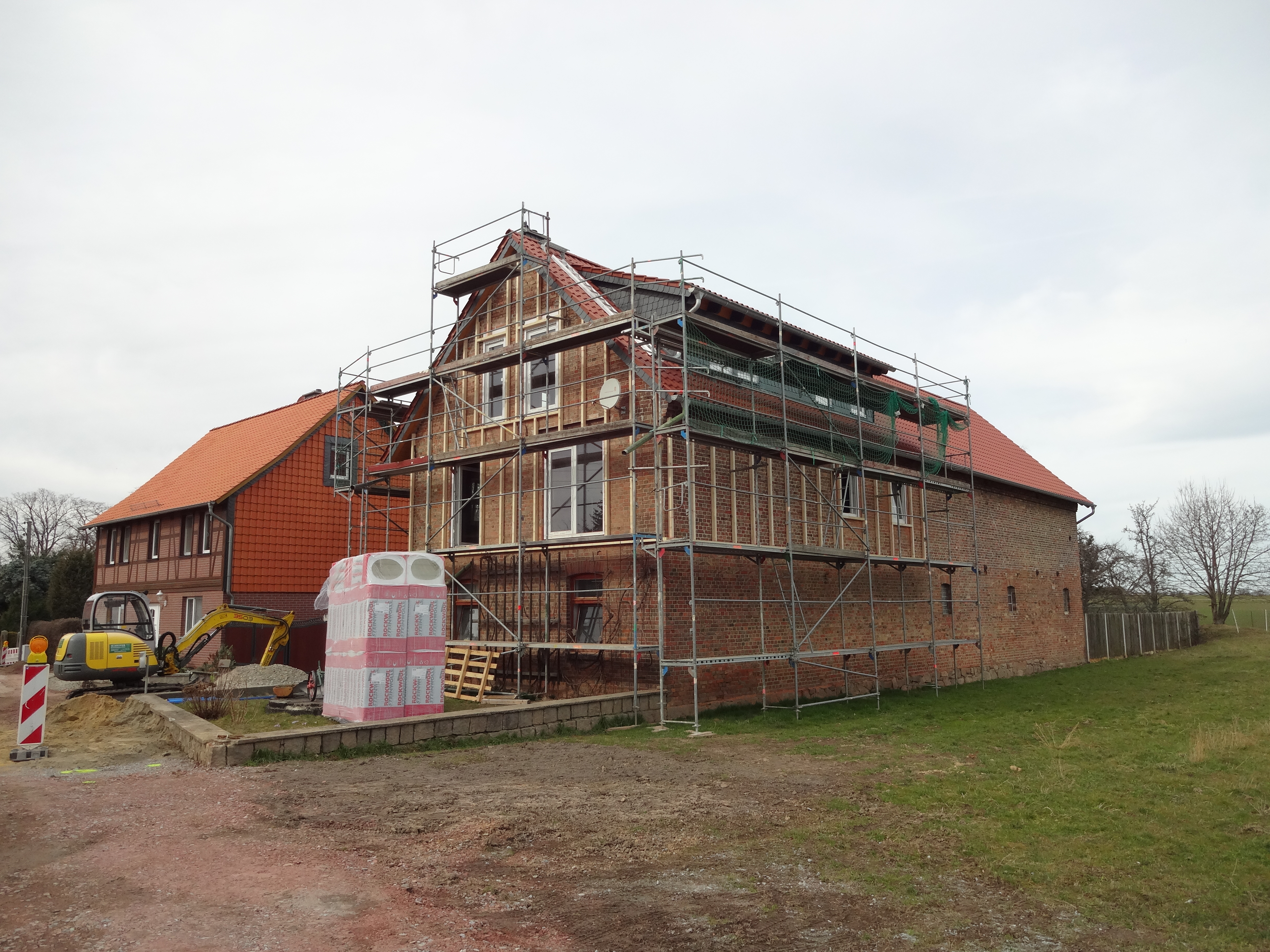 ehemaliges Kulturdenkmal Bauernhaus im Krugberg 17 in Minsleben, Ortsteil von Wernigerode